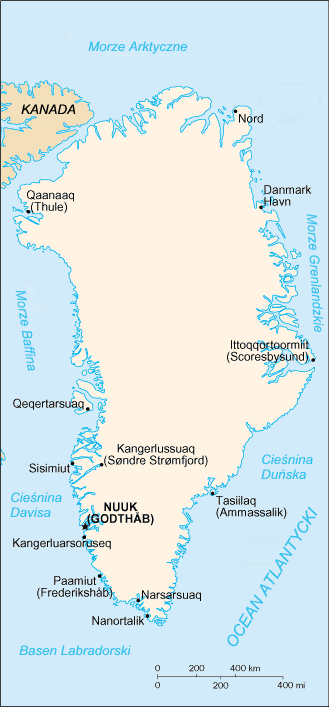 Spolszczona mapa Grenlandii z "CIA-The World Factbook".